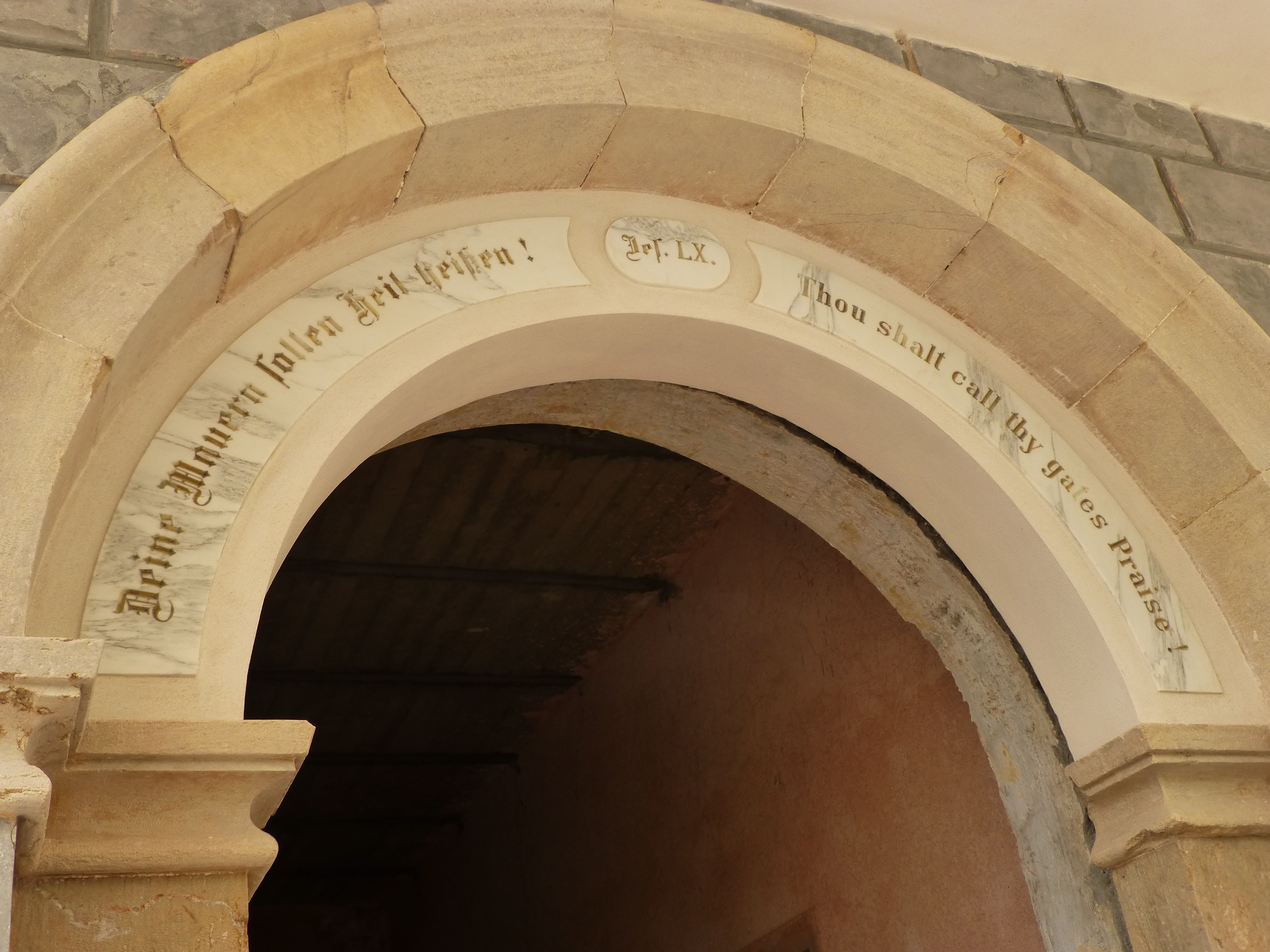 מלון פאר שהוקם בסוף המאה ב-19 במושבה הגרמנית. החדרים המפוארים במלון, שהיו מעוטרים בעיטורי סטנסיל על הקירות קיבלו שמות של נביאים ושליחים,. בשנות הארבעים עבר המלון לידיה של הבולשת הבריטית. לאחר קום המדינה שימש המבנה את משרד החינוך. לאחר שיקום בשנים האחרונות, הפך המלון לחלק ממתחם בנייה יוקרתי במושבה האמריקאית-גרמנית. This is a photo of a heritage building in Israel. Its ID is 3-5000-034